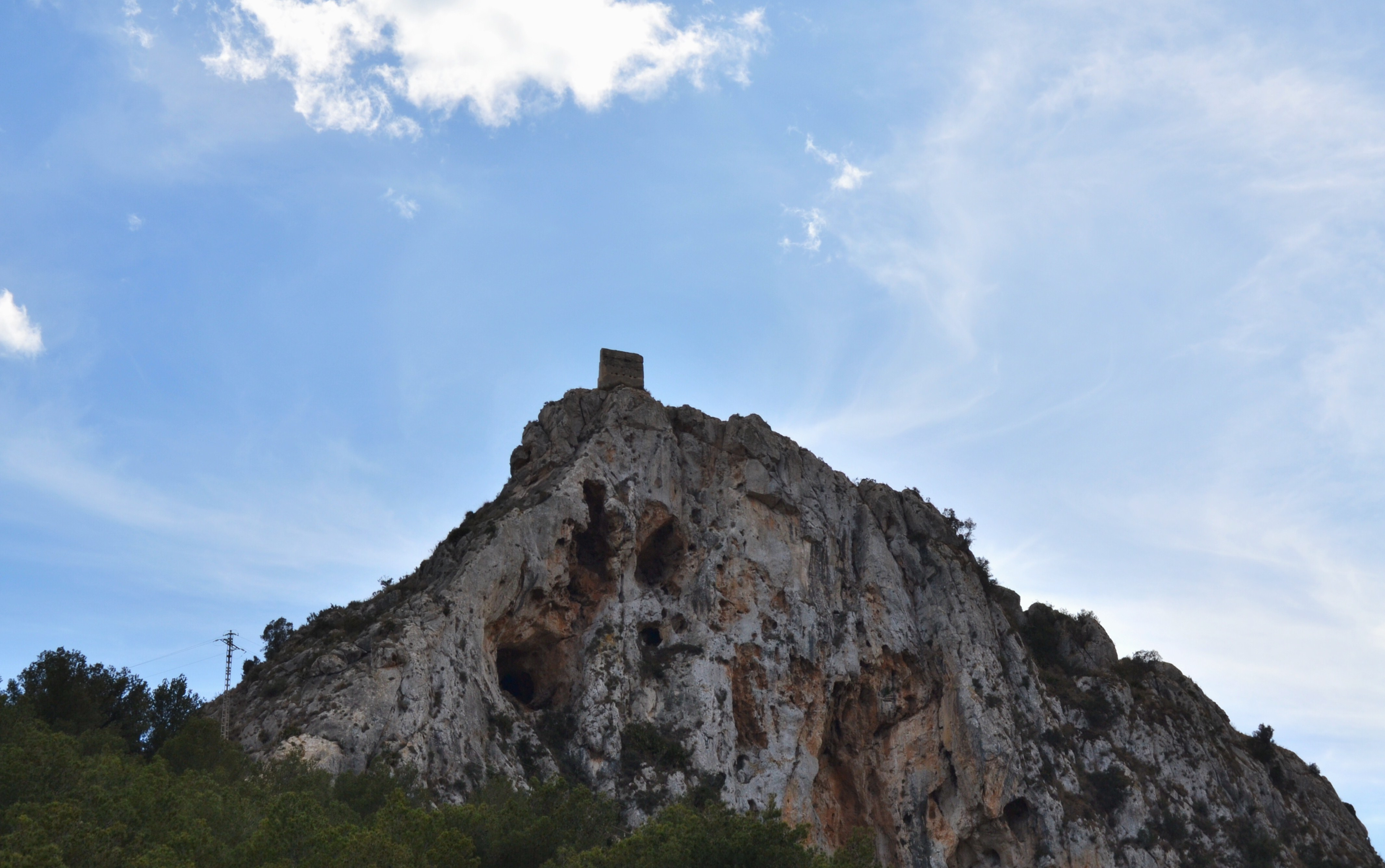 El castellet de Calp des de baix.